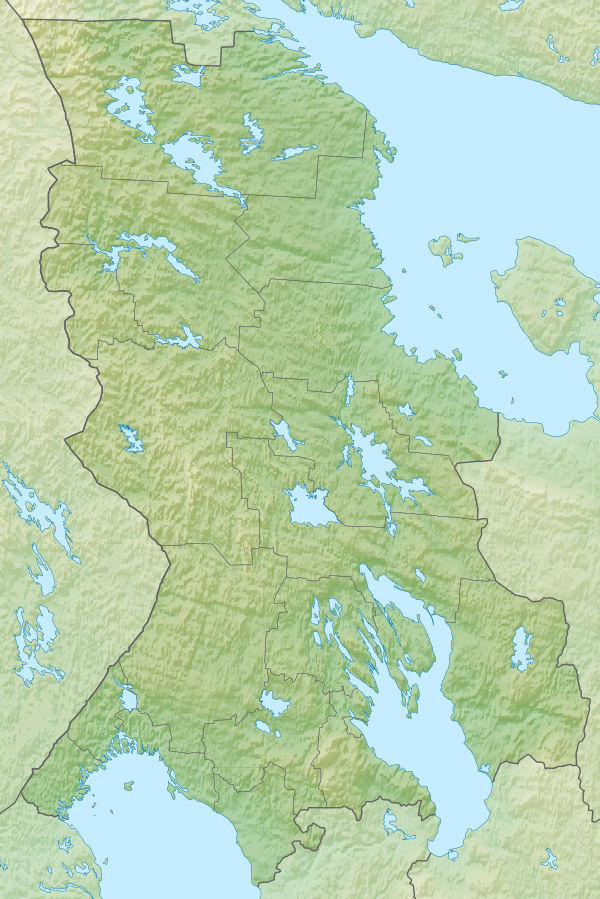 Физическая карта Республики КарелияРавноугольная проекция. Координаты краёв: север — 66.8° С юг — 60.6° С восток — 38.1° В запад — 29.0° В